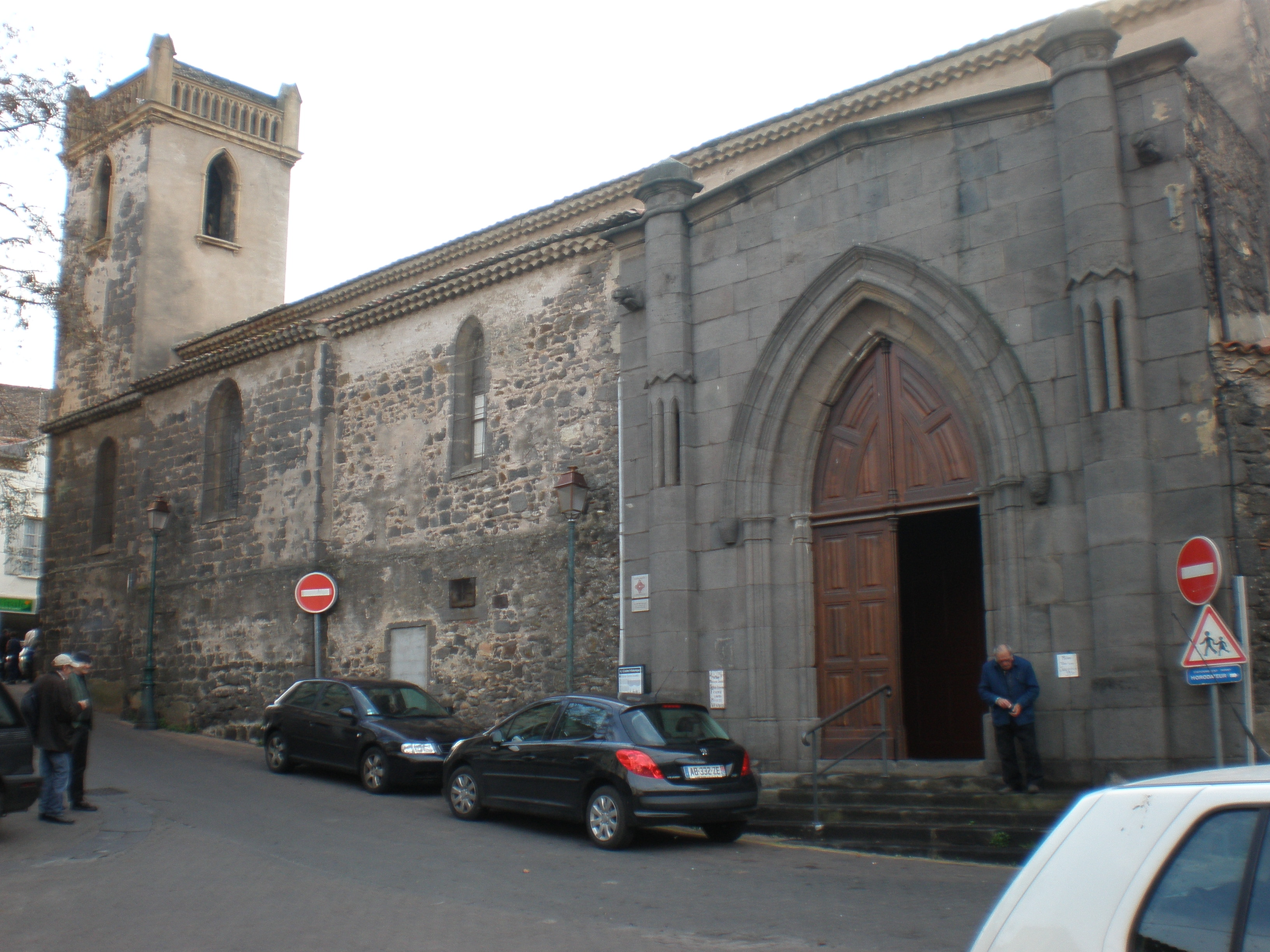 L'église Saint-André d'Agde (Hérault)